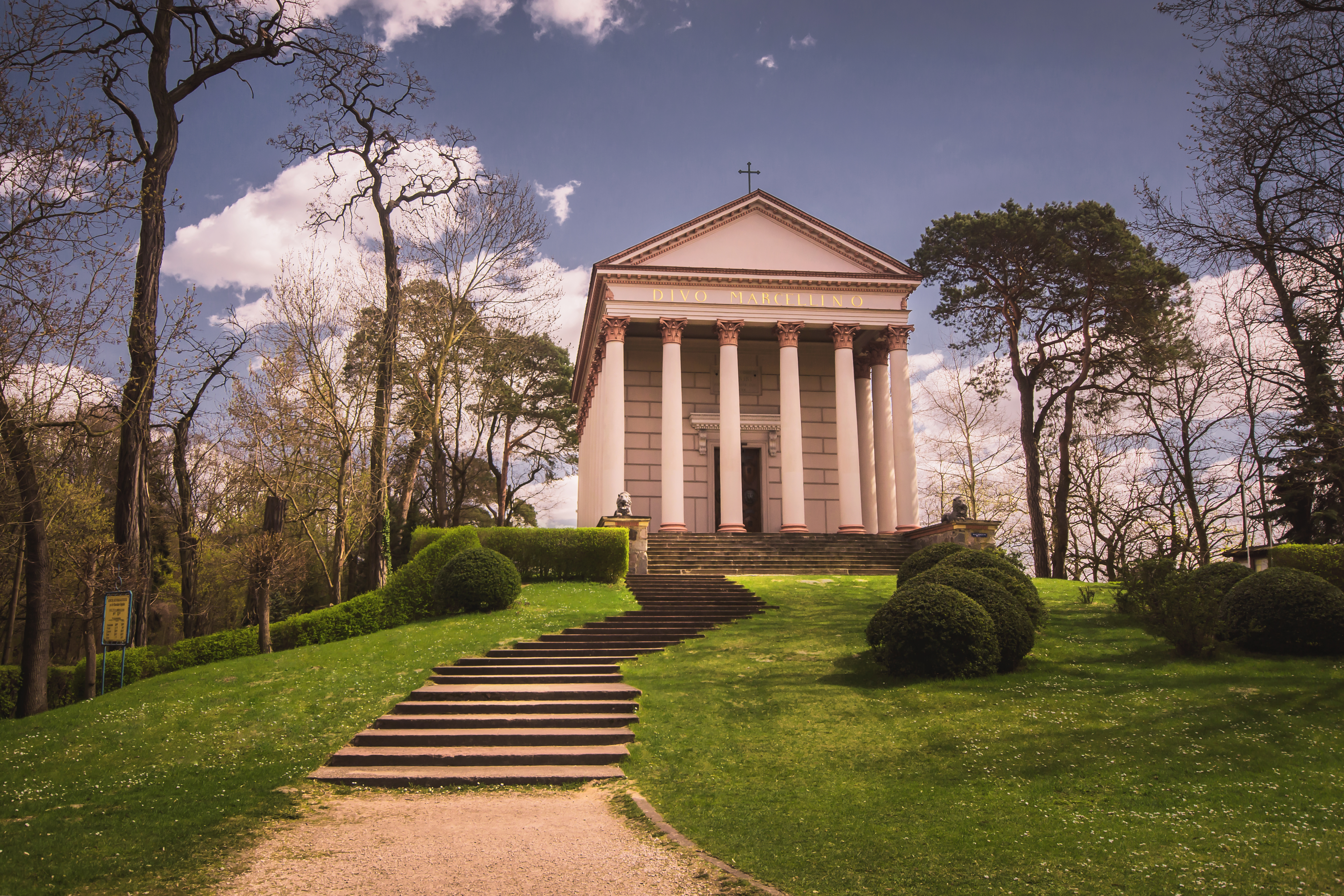 Rogalin, Kaplica pałacowa - mauzoleum rodziny Raczyńskich, ob. kościół św. Marcelina